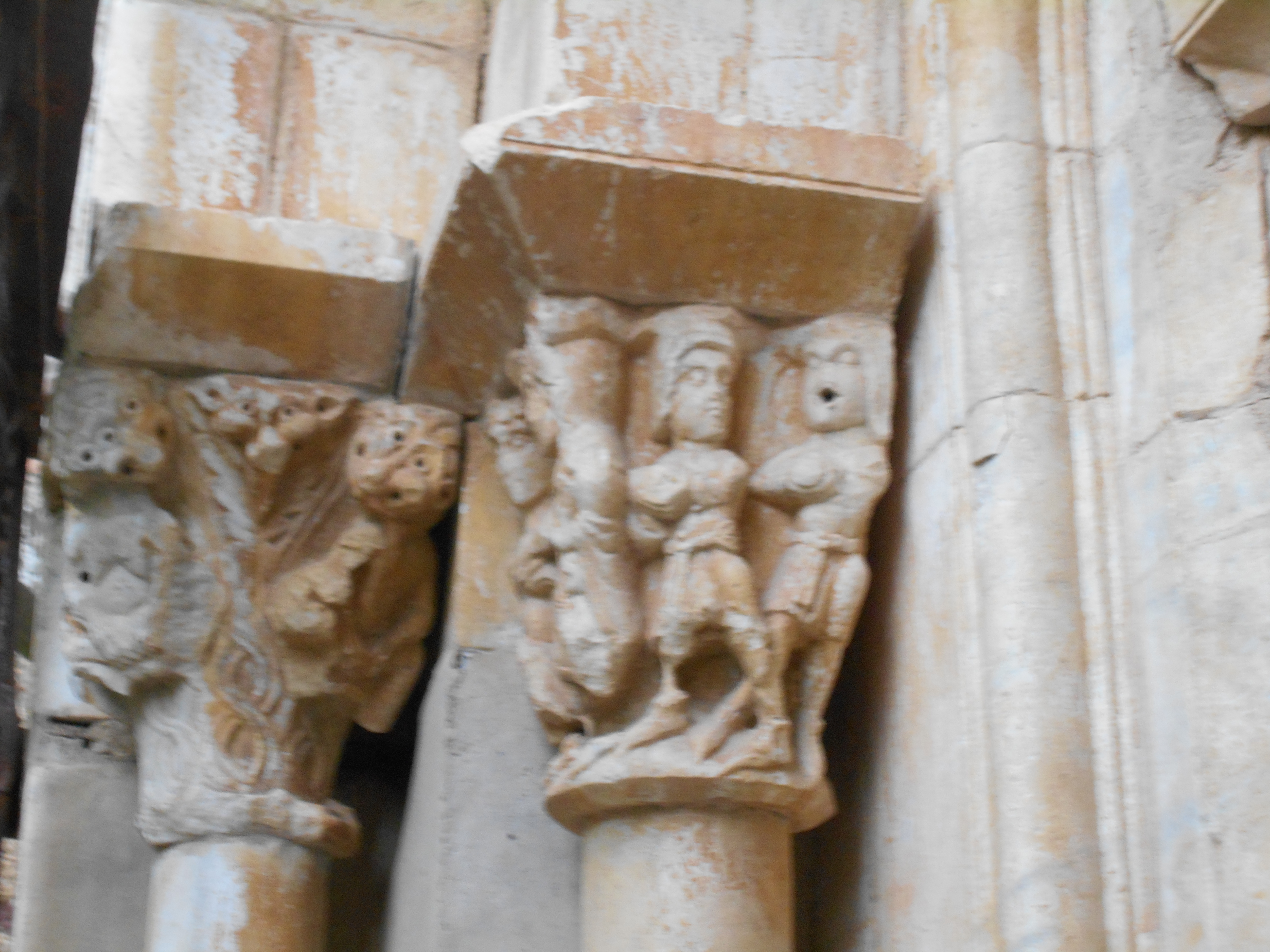 Portalada del Monestir del Camp